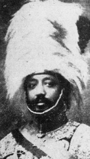 Le Ras Desta.